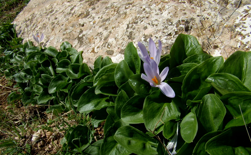 Sierra de Chimeneas